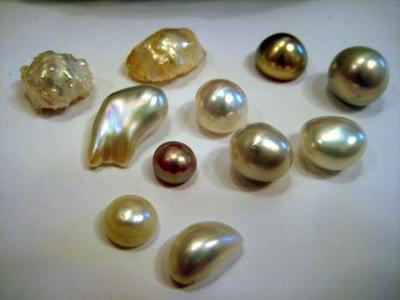 Hình dạng đa dạng của ngọc trai tự nhiên